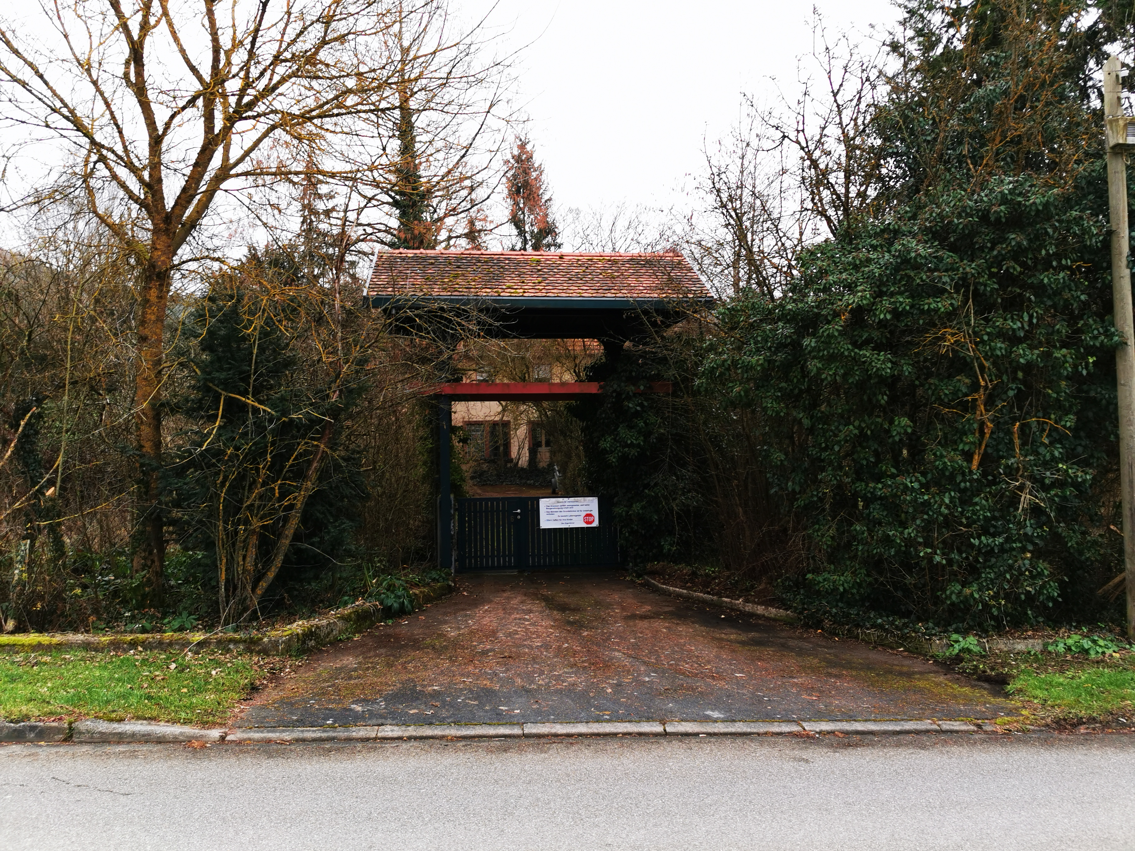 Ortseingang Werbachhausen aus Richtung Werbach